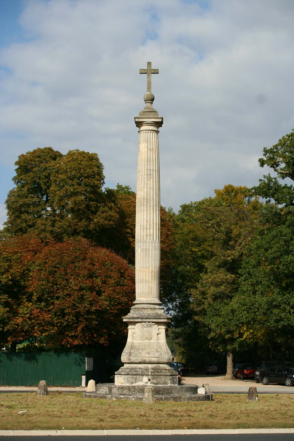 La croix de Noailles dans la forêt de Saint-Germain-en-Laye - Yvelines (France)